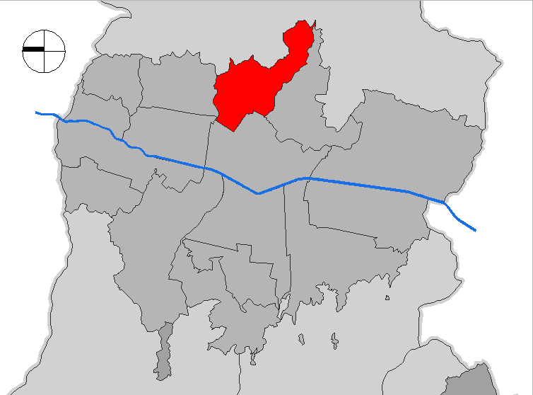 mapa de la comuna Villa Hermosa. Medellín, Colombia.